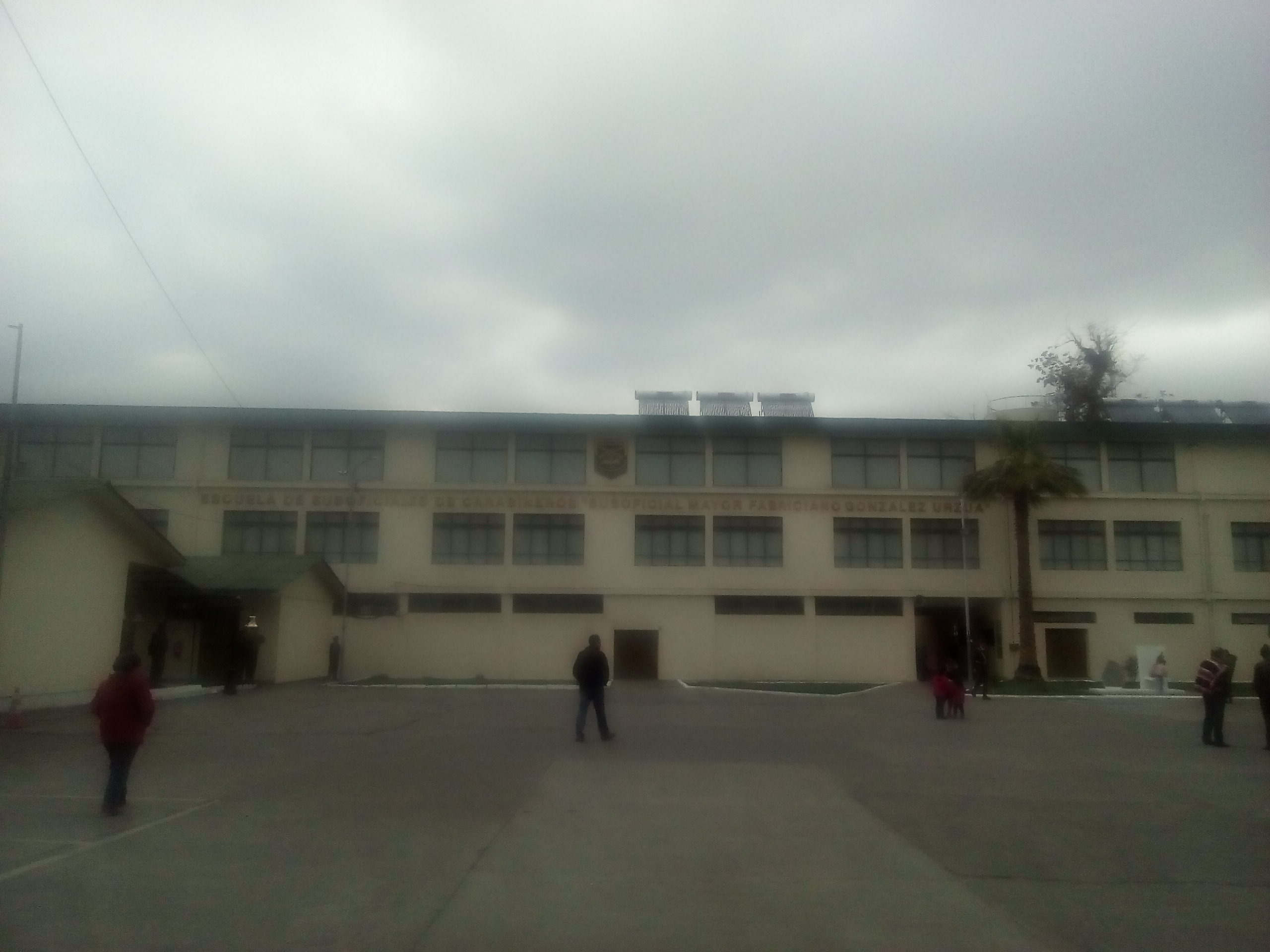 Escuela Fabriciano González Urzúa